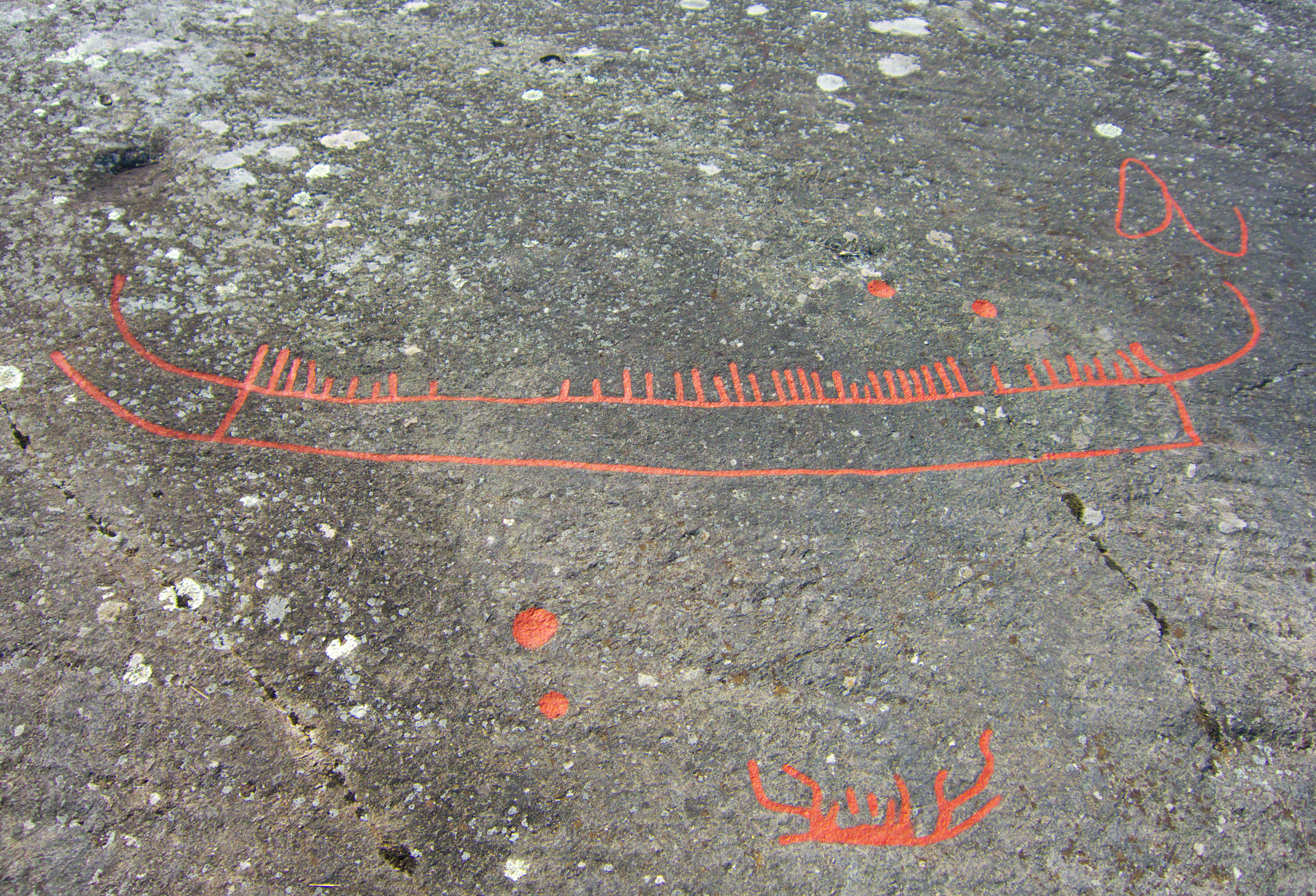 Skeppsristning, Stora Rickebyhällen, Boglösa socken